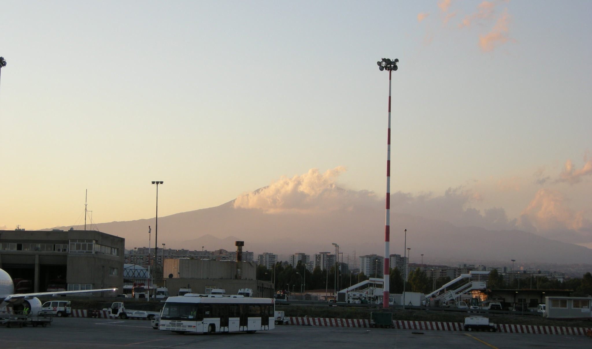 Aeroporto di catania, veduta etna